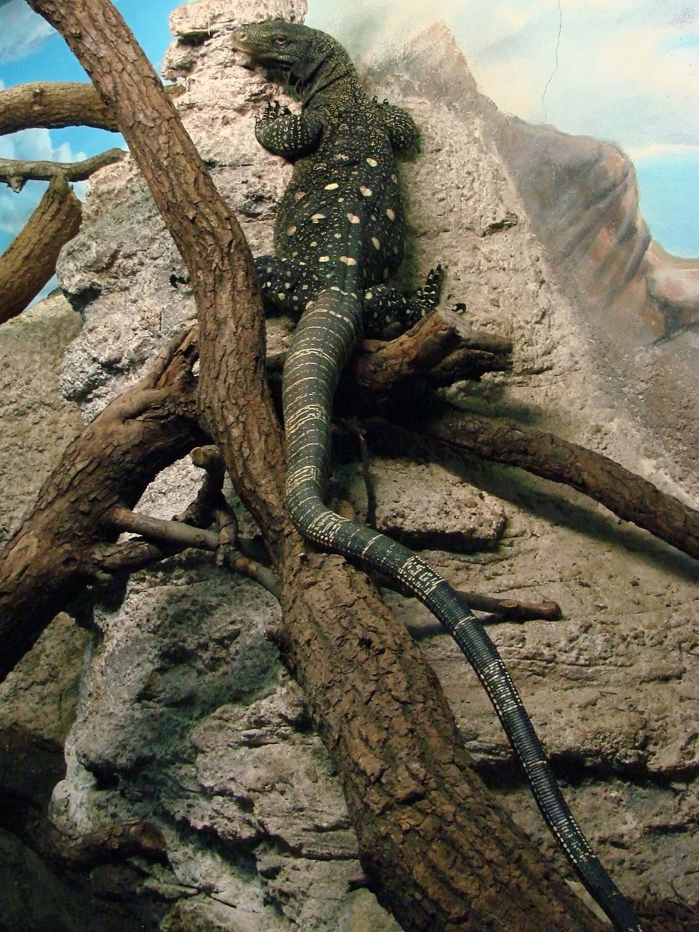 Varan géant de Papouasie (Varanus salvadorii), zoo d'Amnéville.